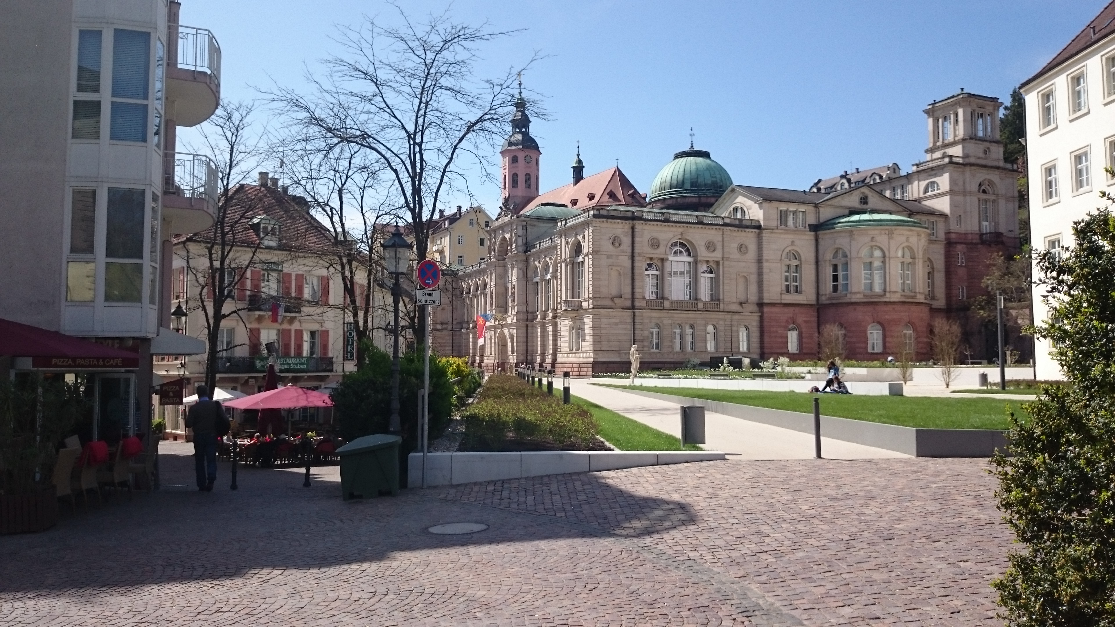 Baden-Baden